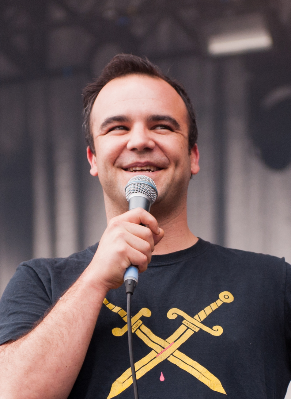 Die Band Future Islands auf dem Kosmonaut Festival 2015 in Chemnitz Oberrabenstein.